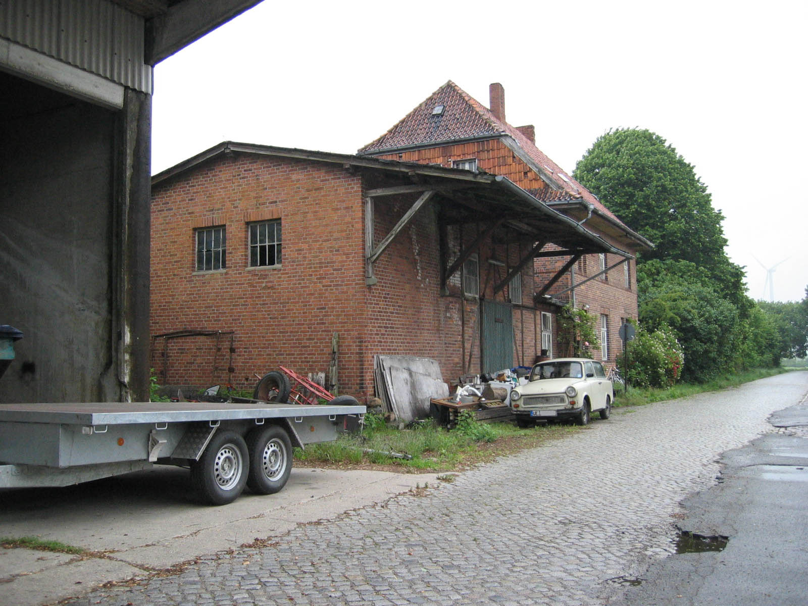 Bahnhofsgebäude Oetzen, Straßenseite